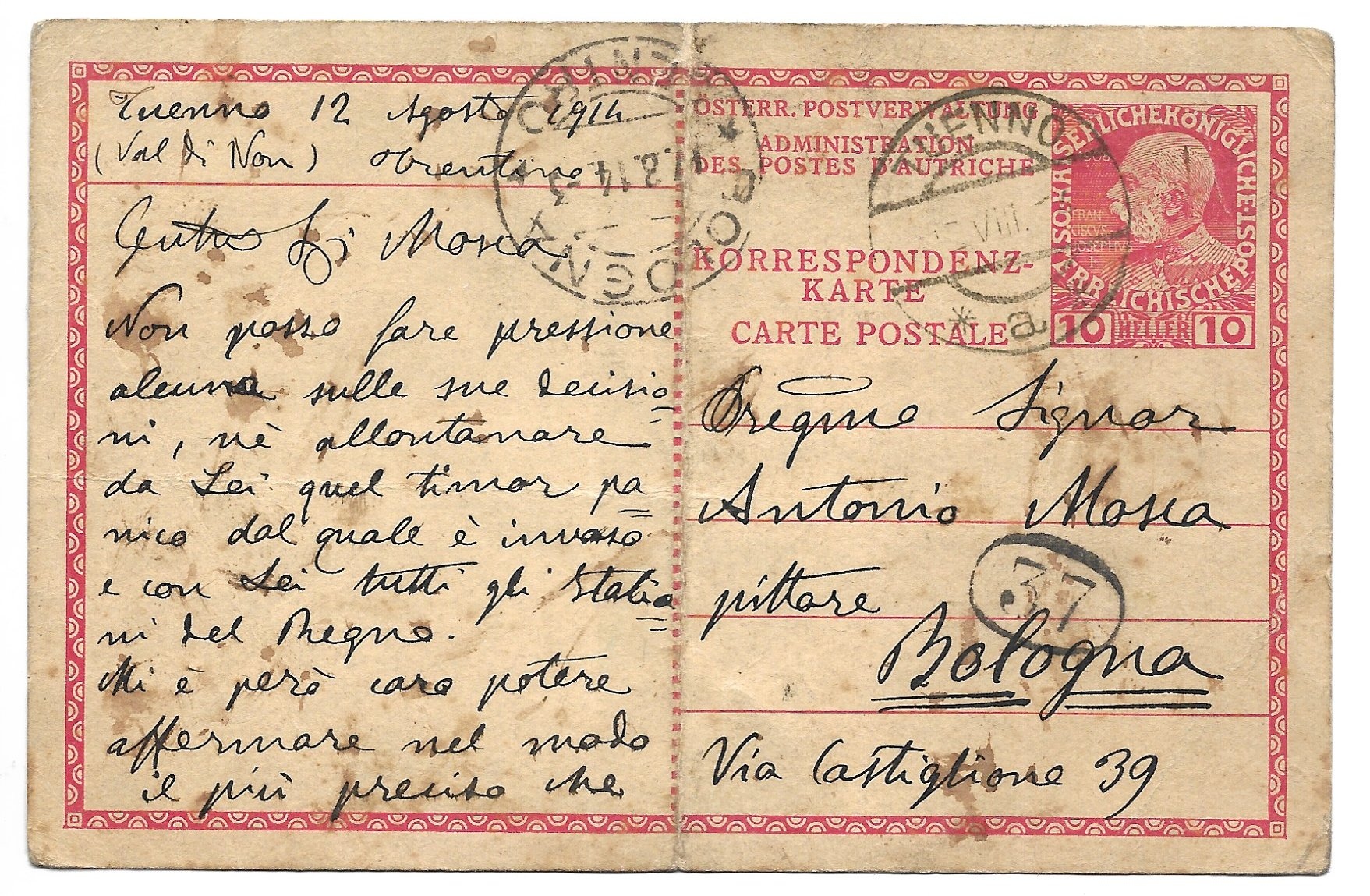 Cartolina postale spedita da Tuenno da Sigismondo Nardi a Antonio Mosca via Castiglione 39 Bologna